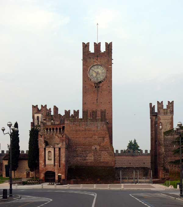 Castello Scaligero di Villafranca -Torre maggiore, facciata nord